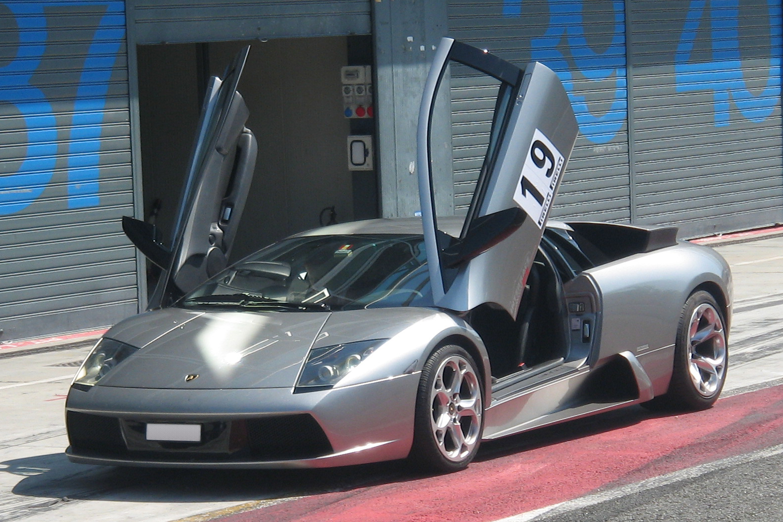 Lamborghini Murciélago at Monza